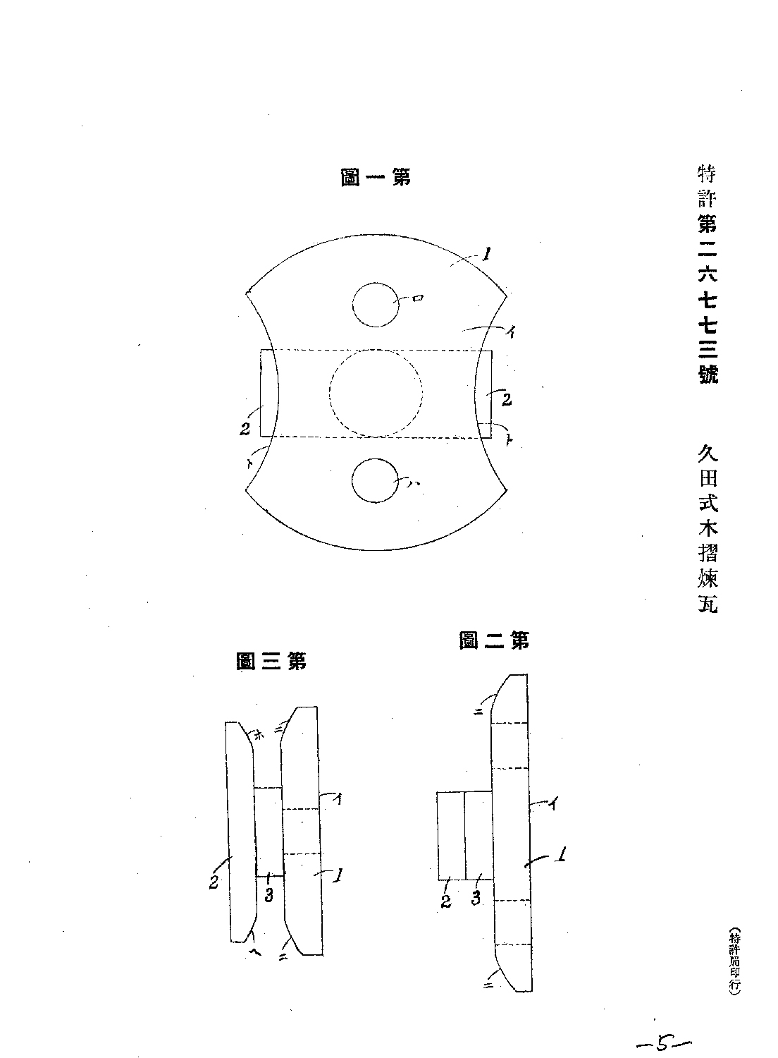 落剥を防ぐ工夫のなされている